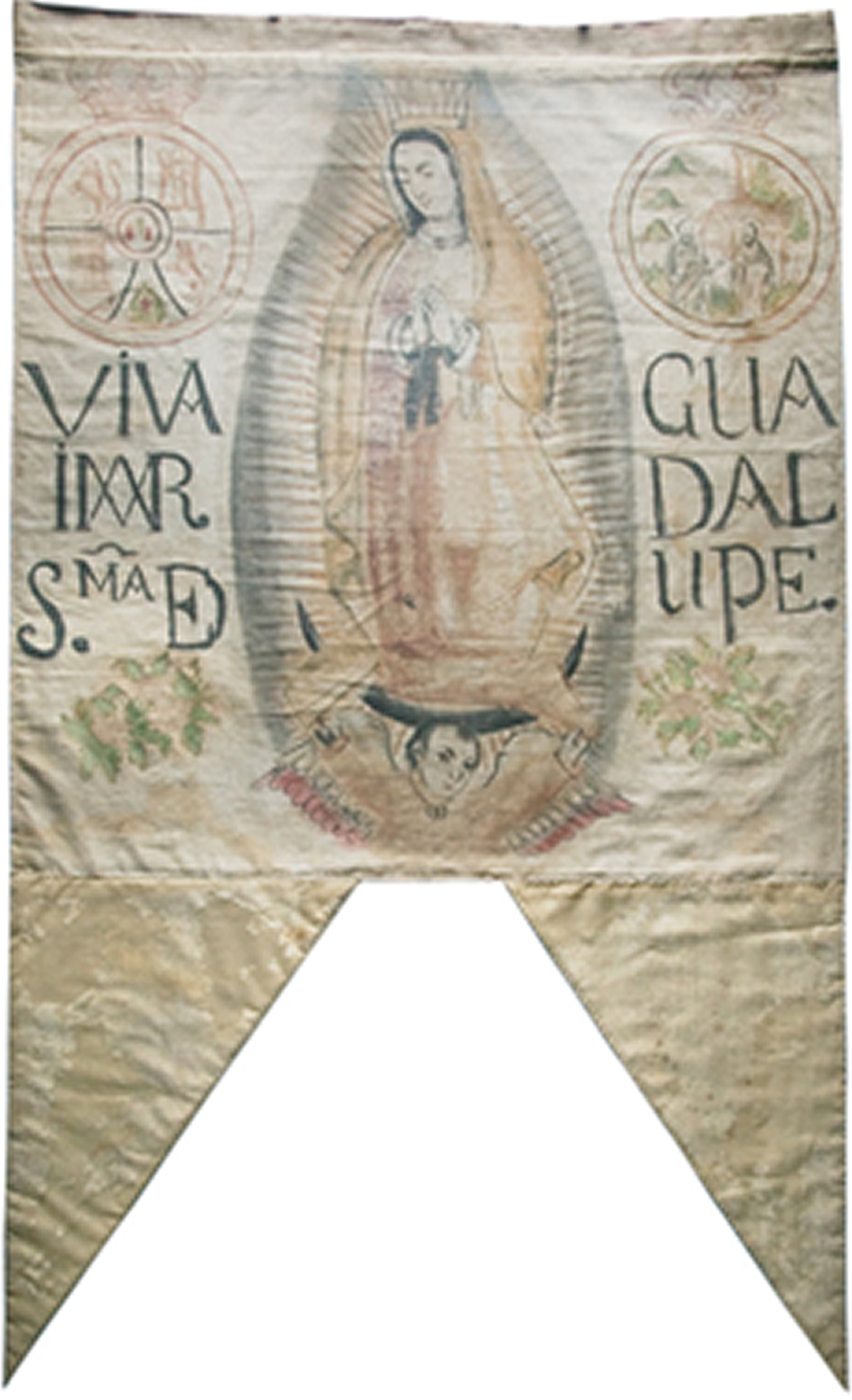 Estandarte utilizado por las fuerzas insurgentes. Óleo y acuarela sobre tela.